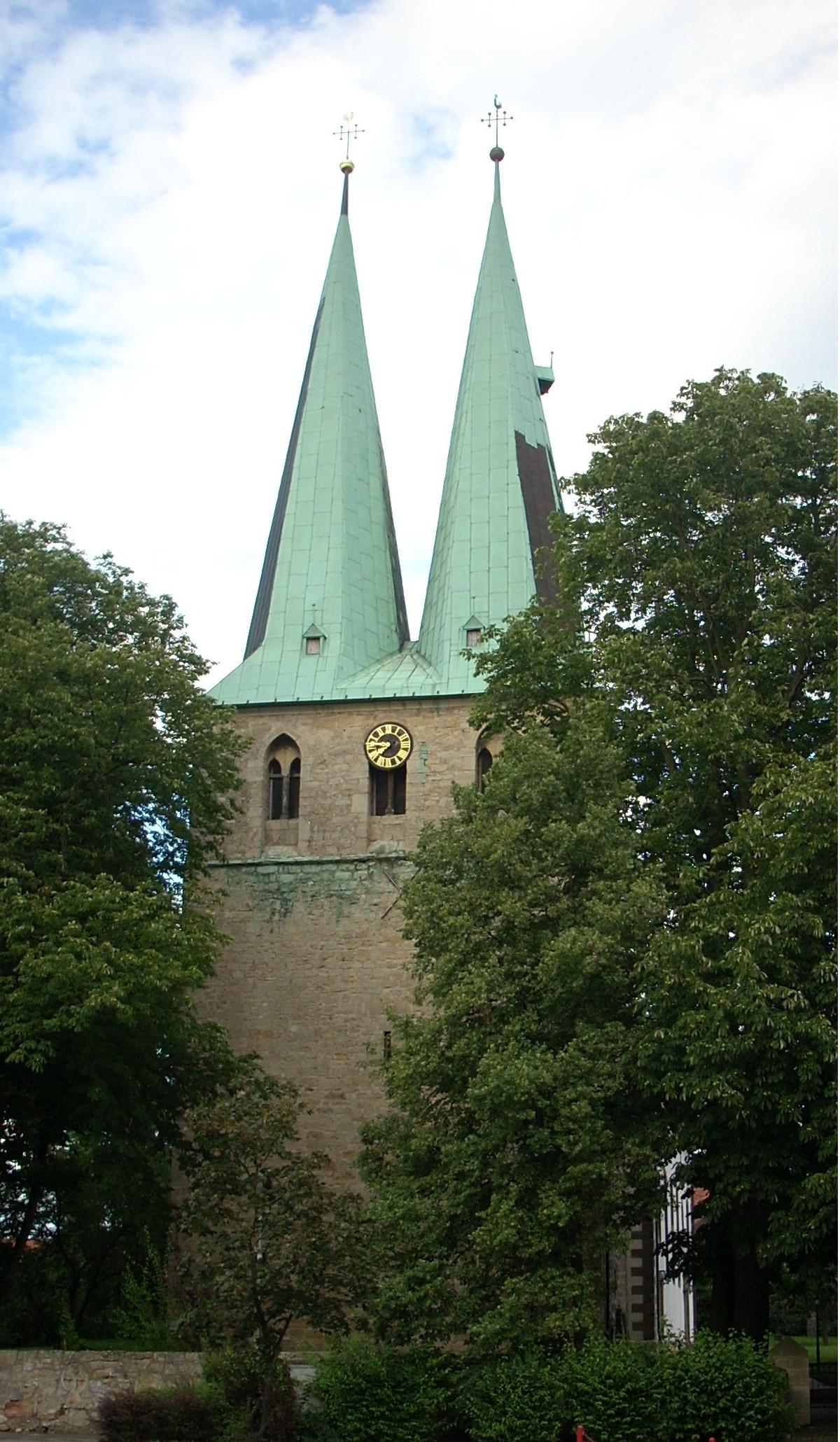 Ev. Kirche St. Laurentius, Hohenhameln, Germany